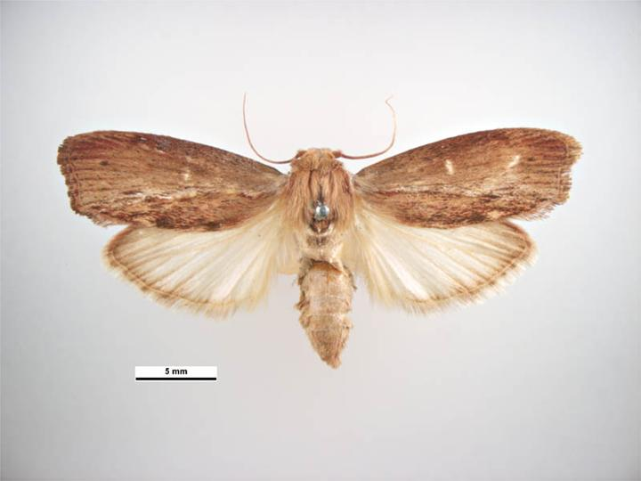 Galleria mellonella dorsal view